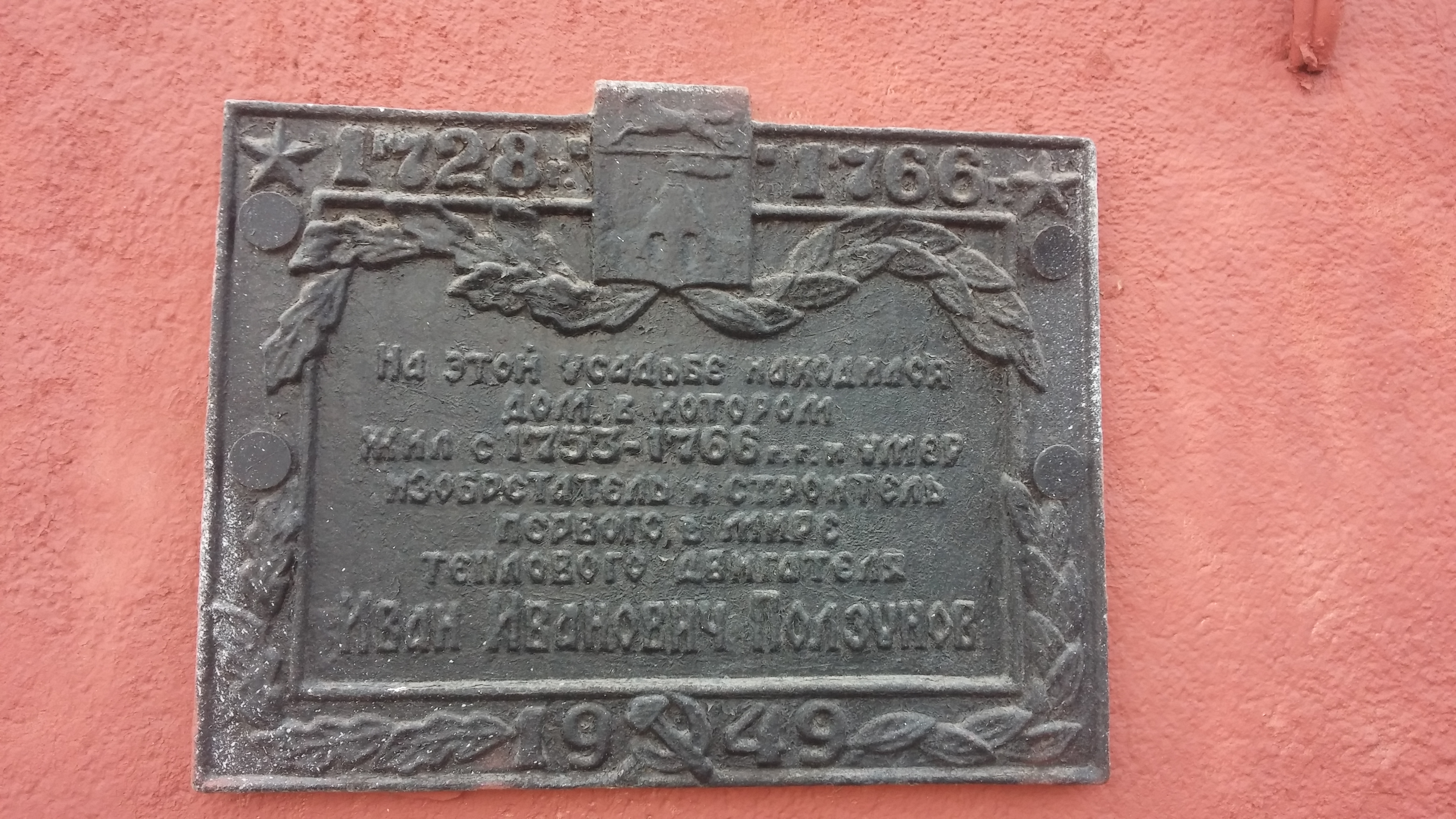 Мемориальная доска И. И. Ползунову: улица Пушкина, 78, Барнаул, Алтайский край